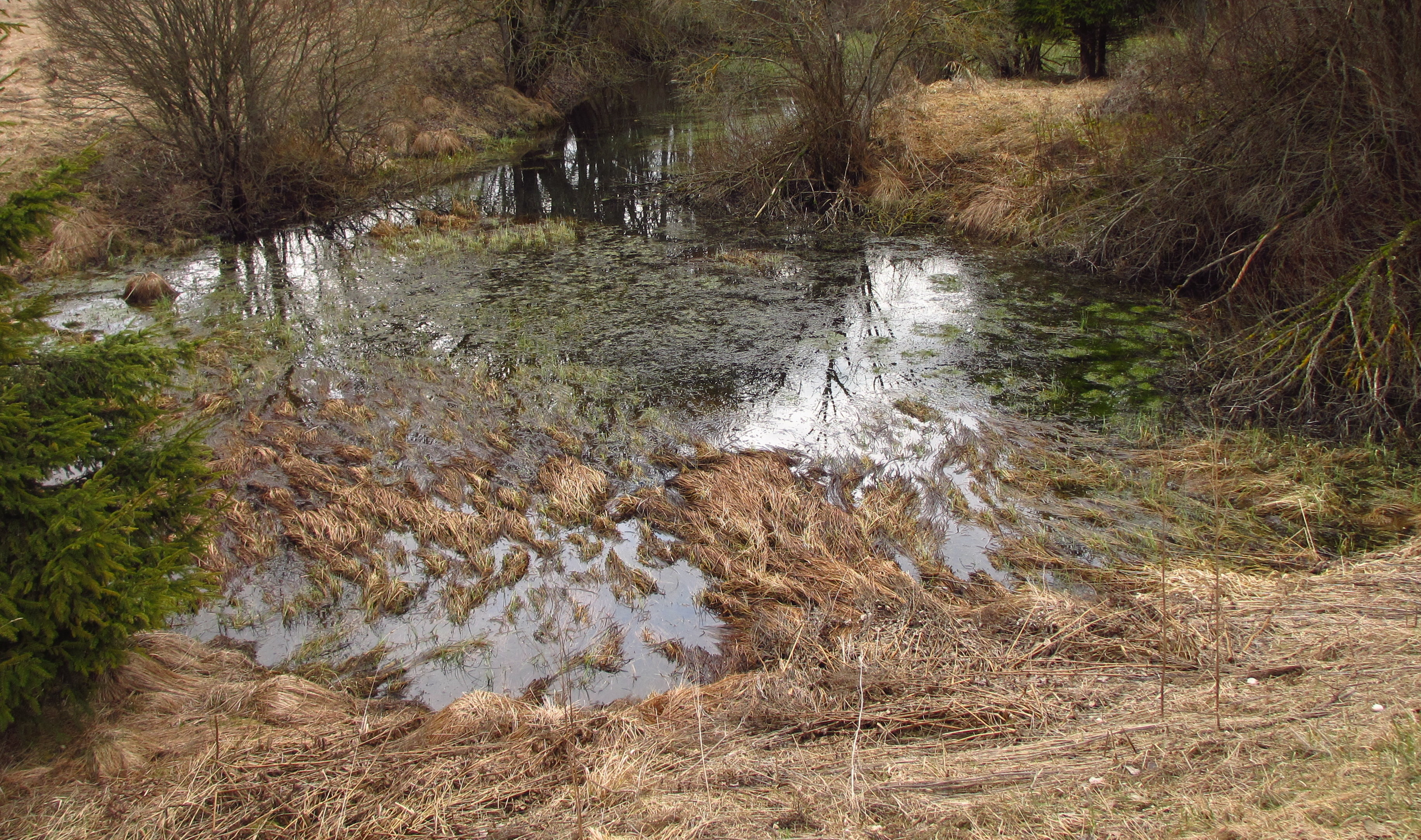 Purila allikad